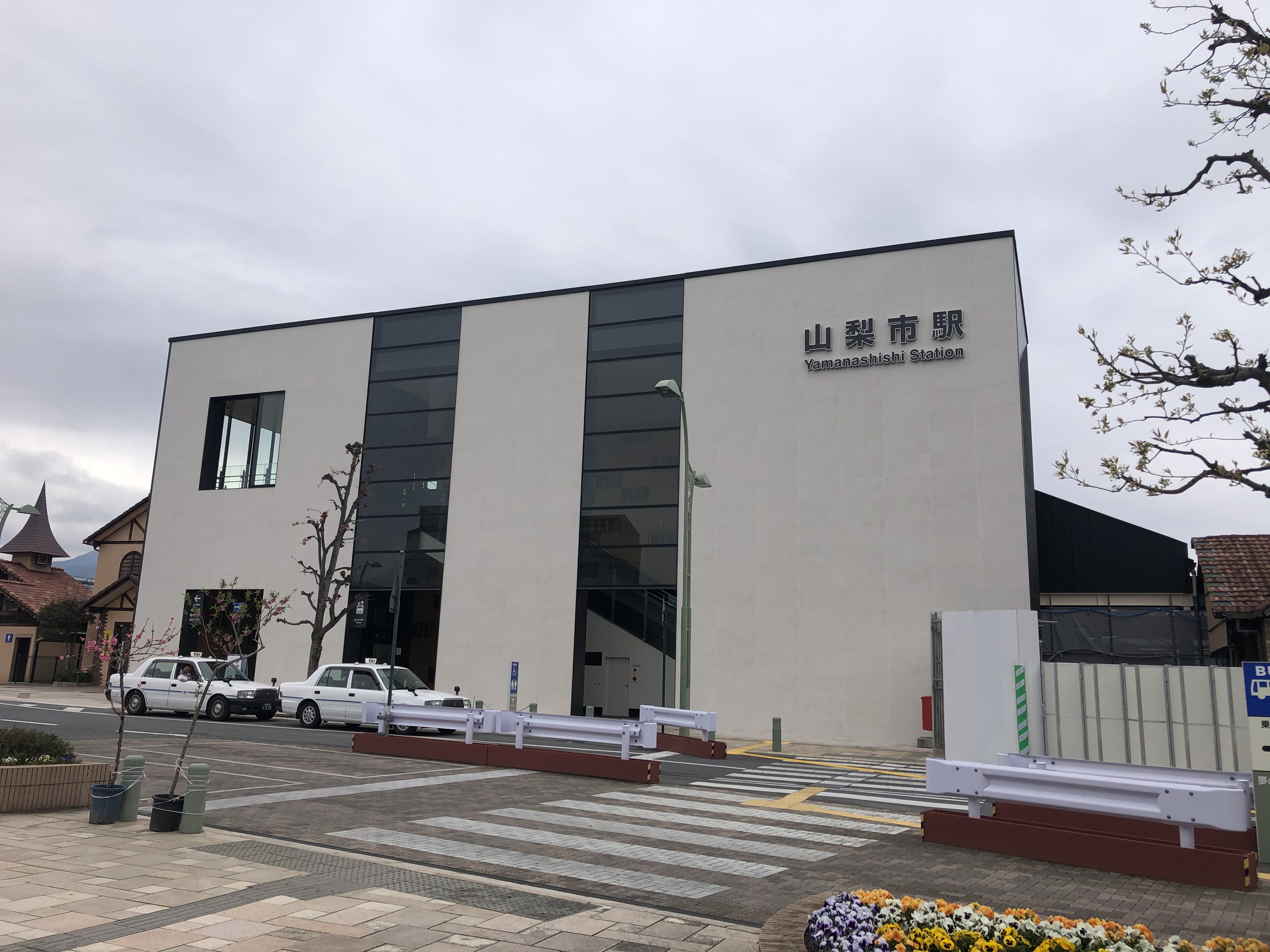 2020年供用開始の山梨市駅の新しい駅舎